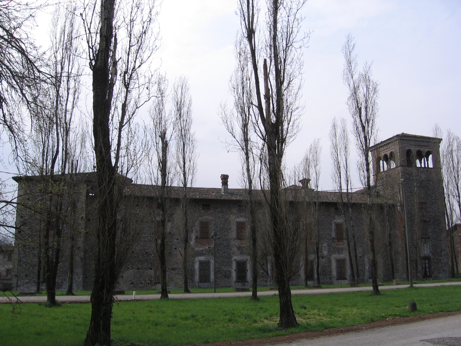 Castello di Cavernago, Bergamo, Italia